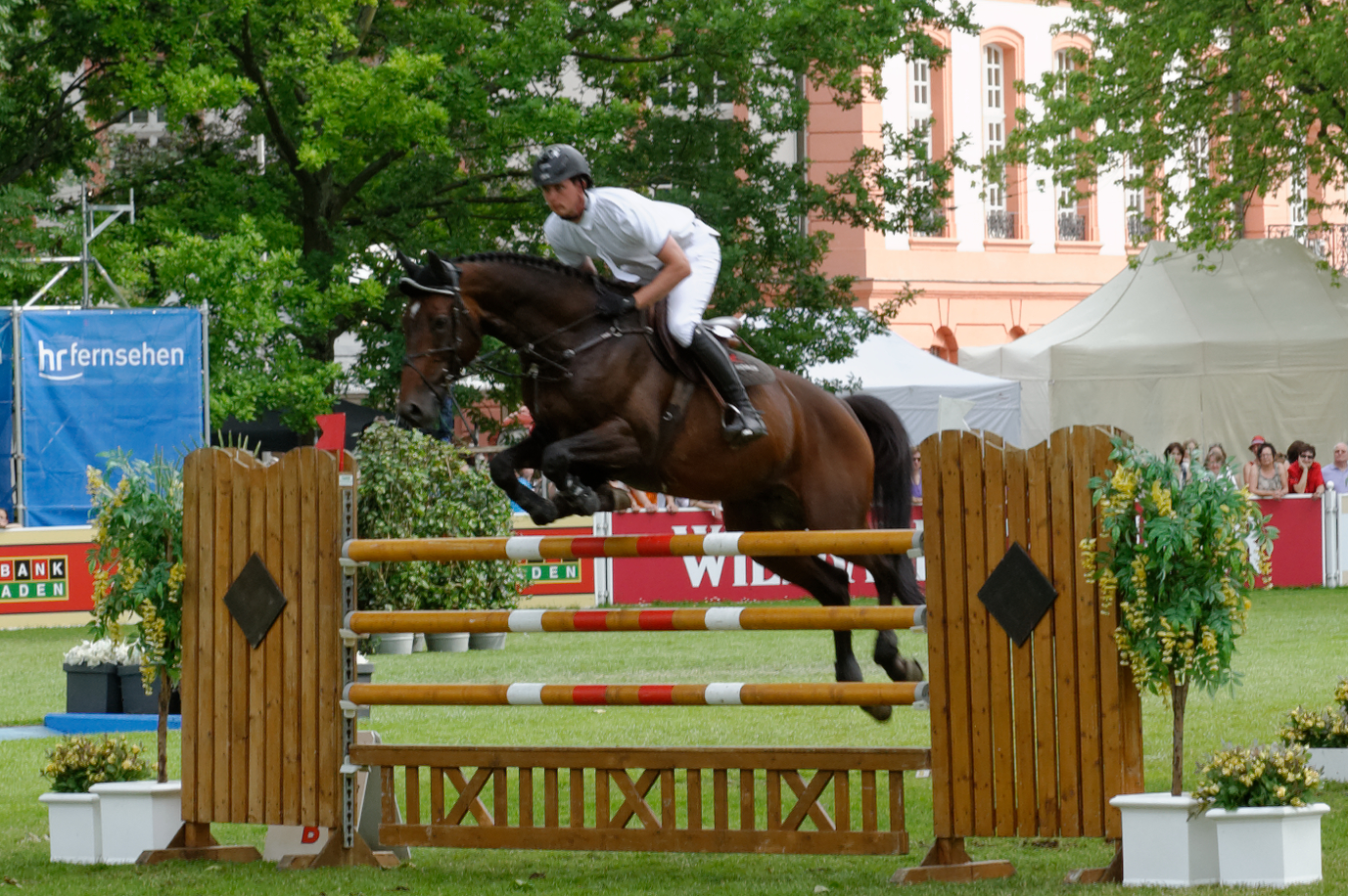 Felix Haßmann mit Quali Quanti, Internationales Pfingstturnier 2014 Wiesbaden, Welfenhofpreis, CSI*** The making of this document was supported by the Community-Budget of Wikimedia Germany.